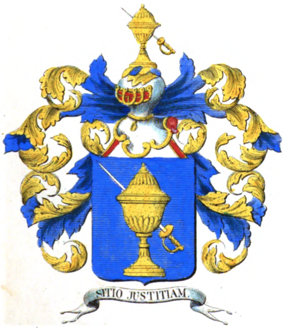 Armoiries de la famille Coppieters